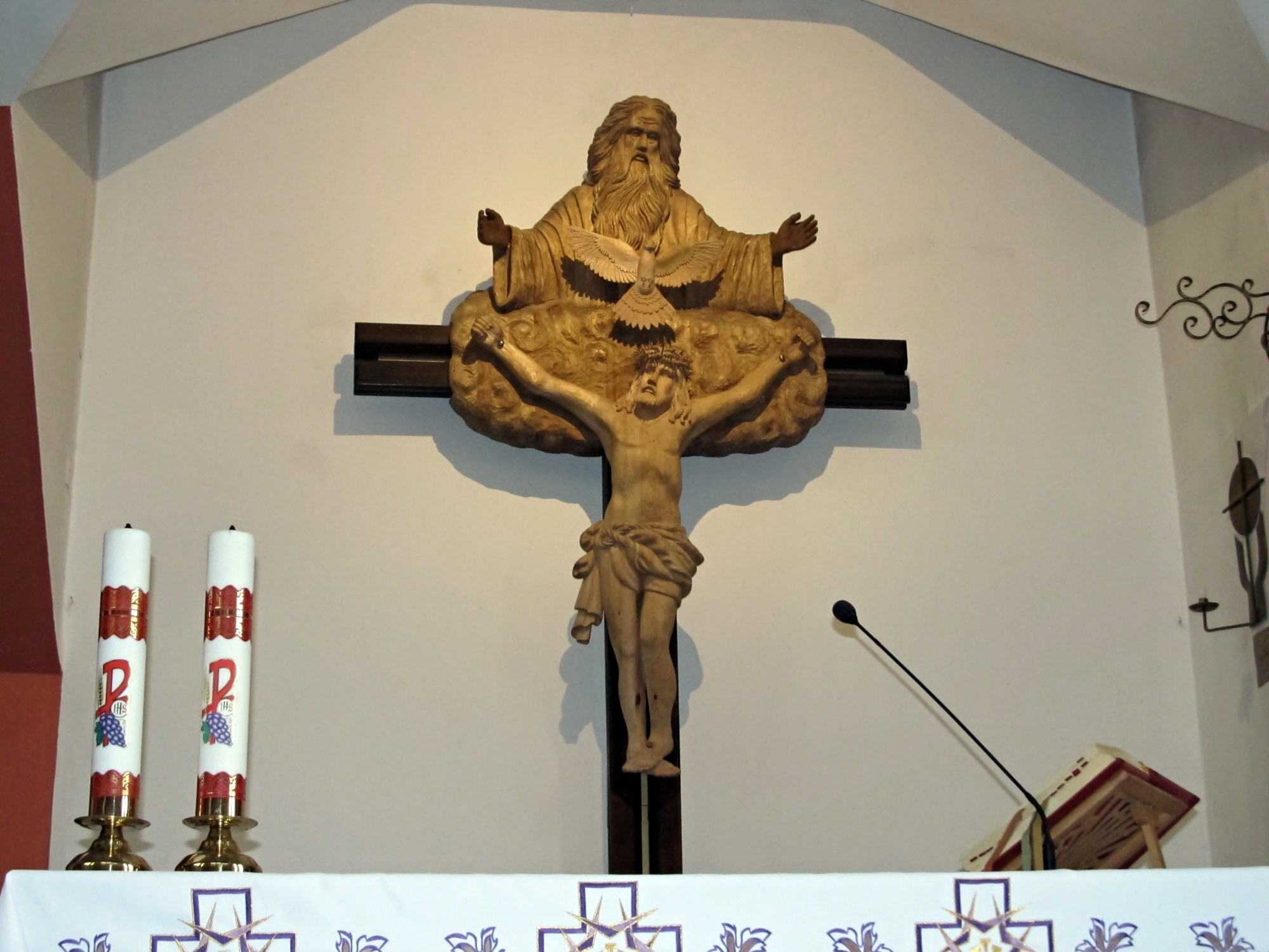 Rzeźba dłuta Ryszarda Prill przedstawiająca Trójcę Świętą w głównym ołtarzu